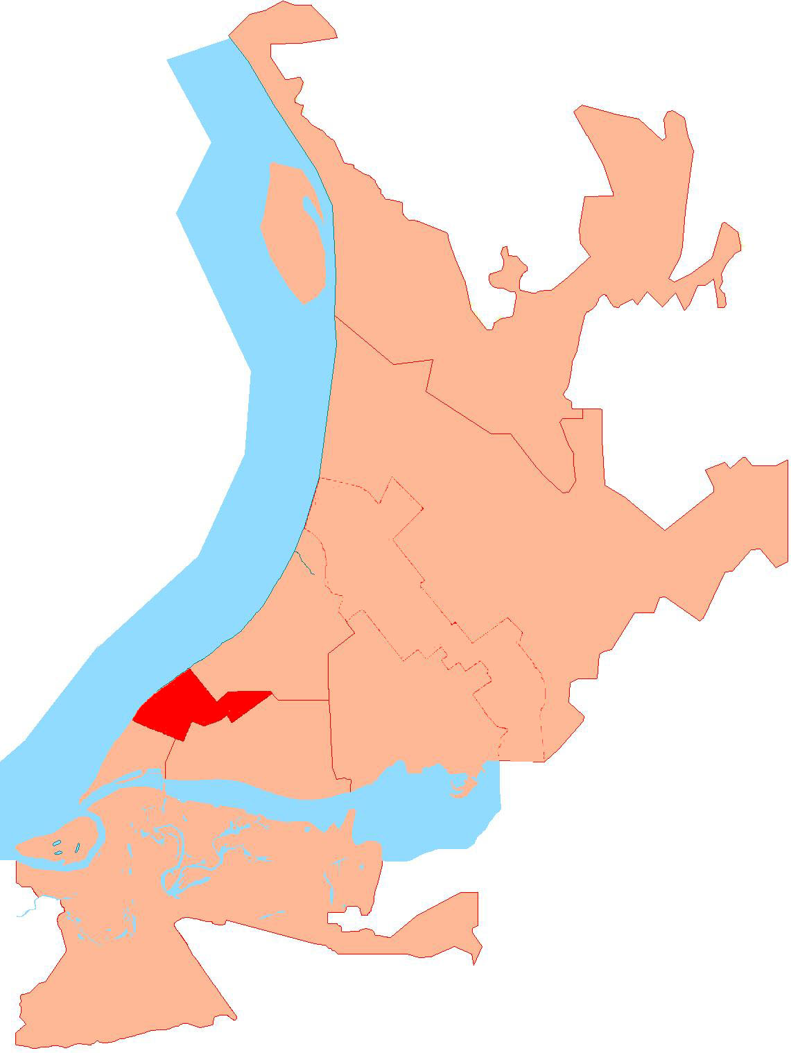 Samara district